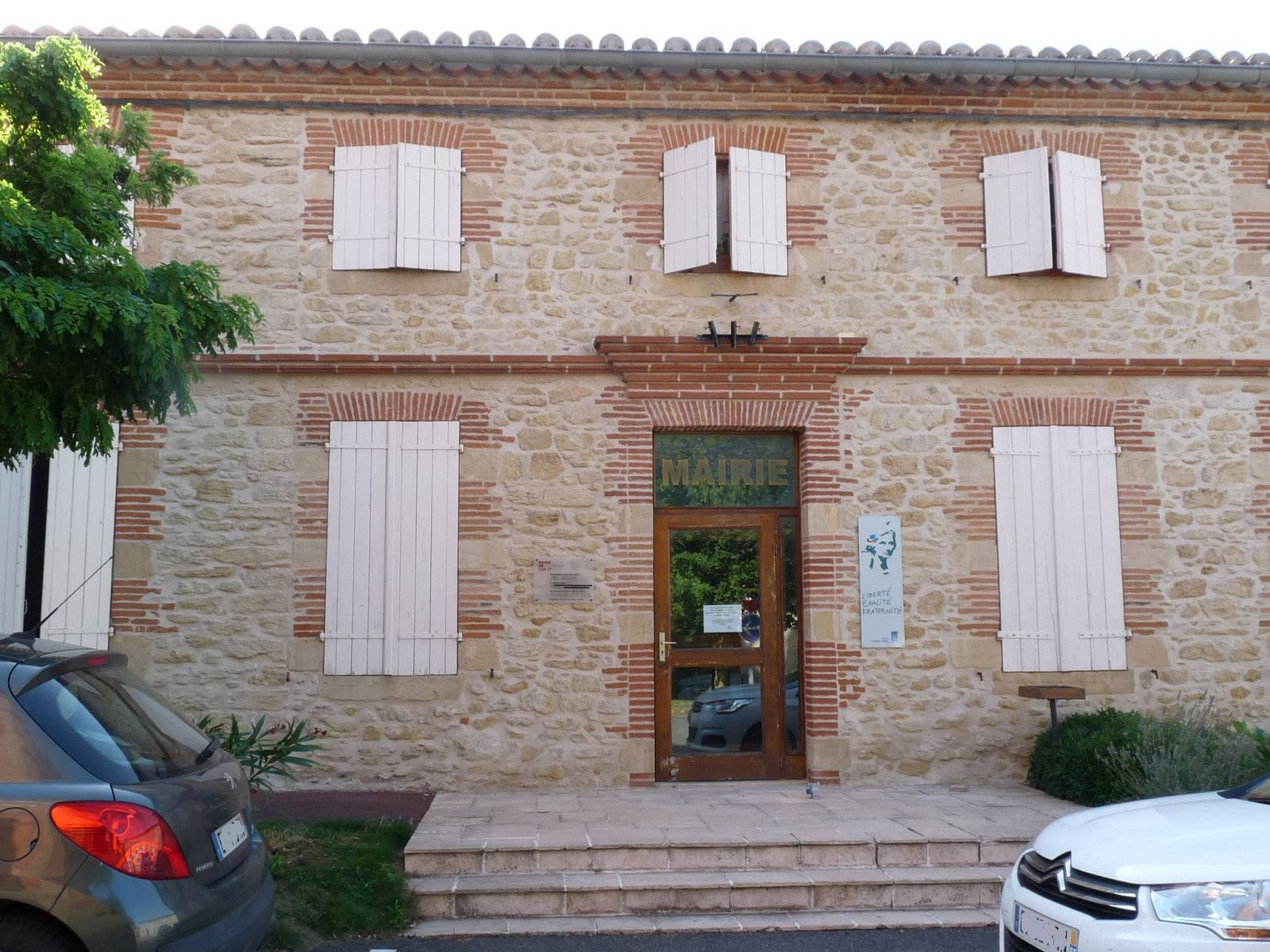 Mairie de Lux, Haute-Garonne, France